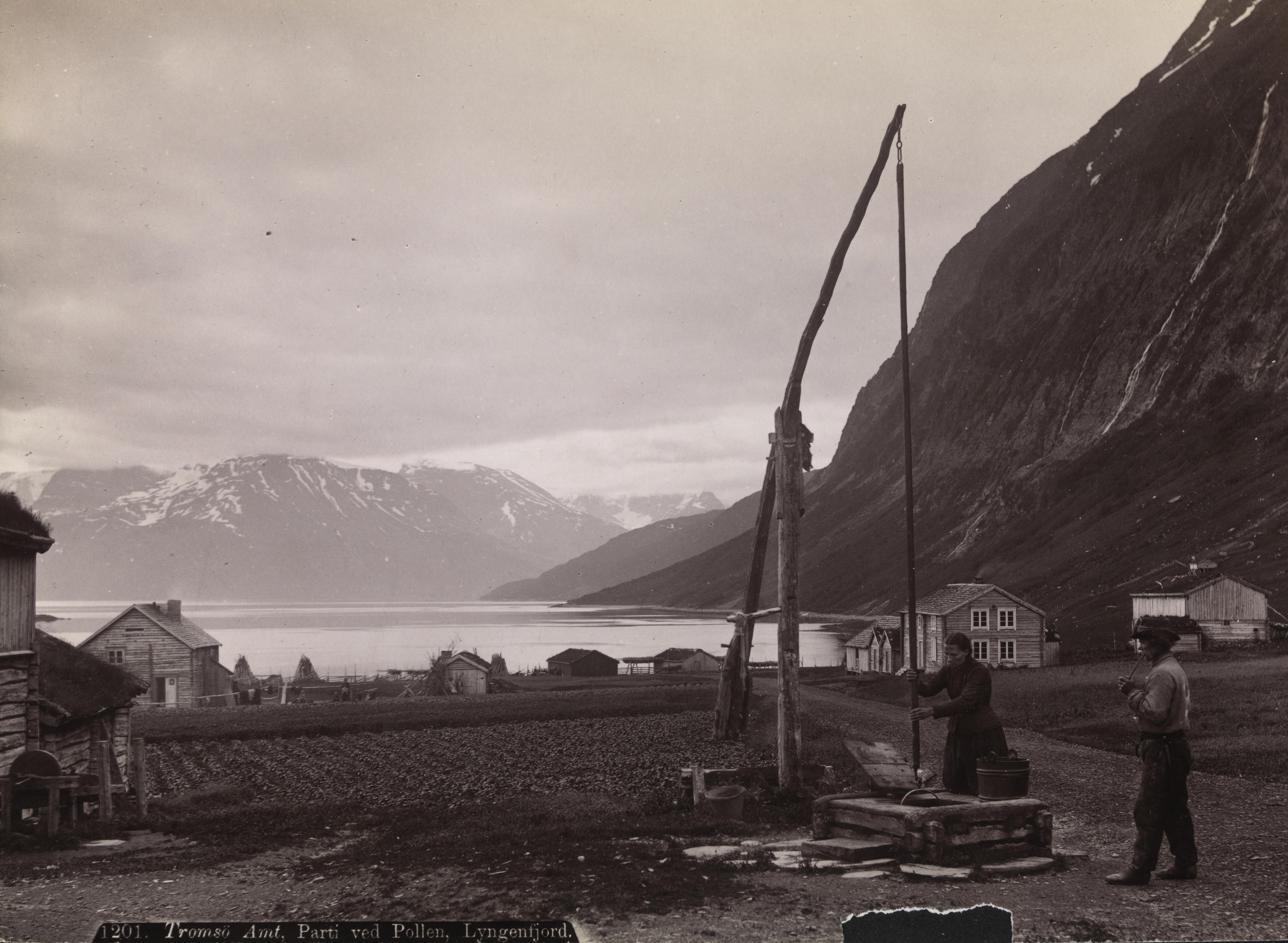 Bildet er hentet fra Nasjonalbibliotekets bildesamling Pollen, Lyngen, Troms